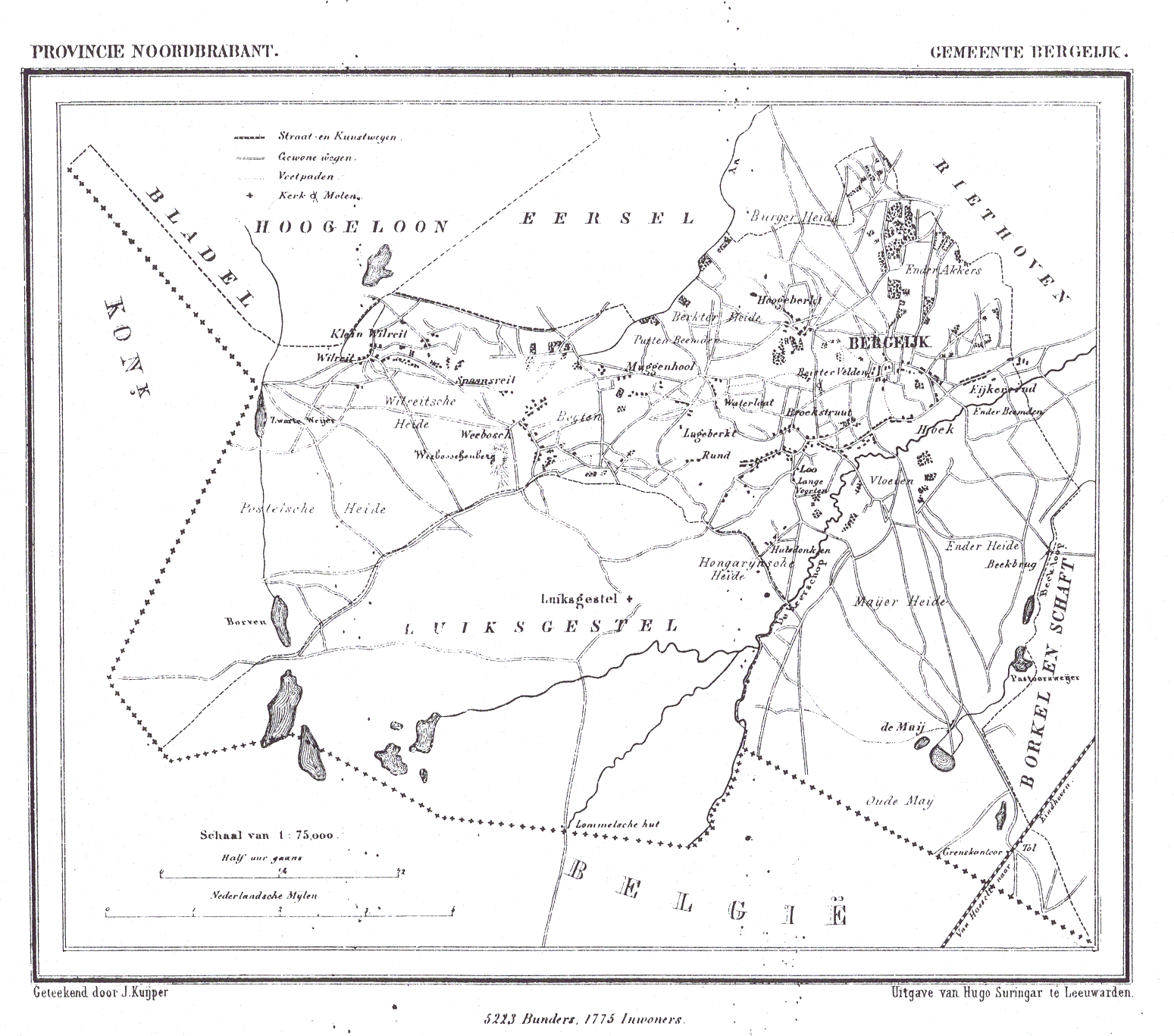 Nederland, Noord-Brabant, Gemeente Bergeijk